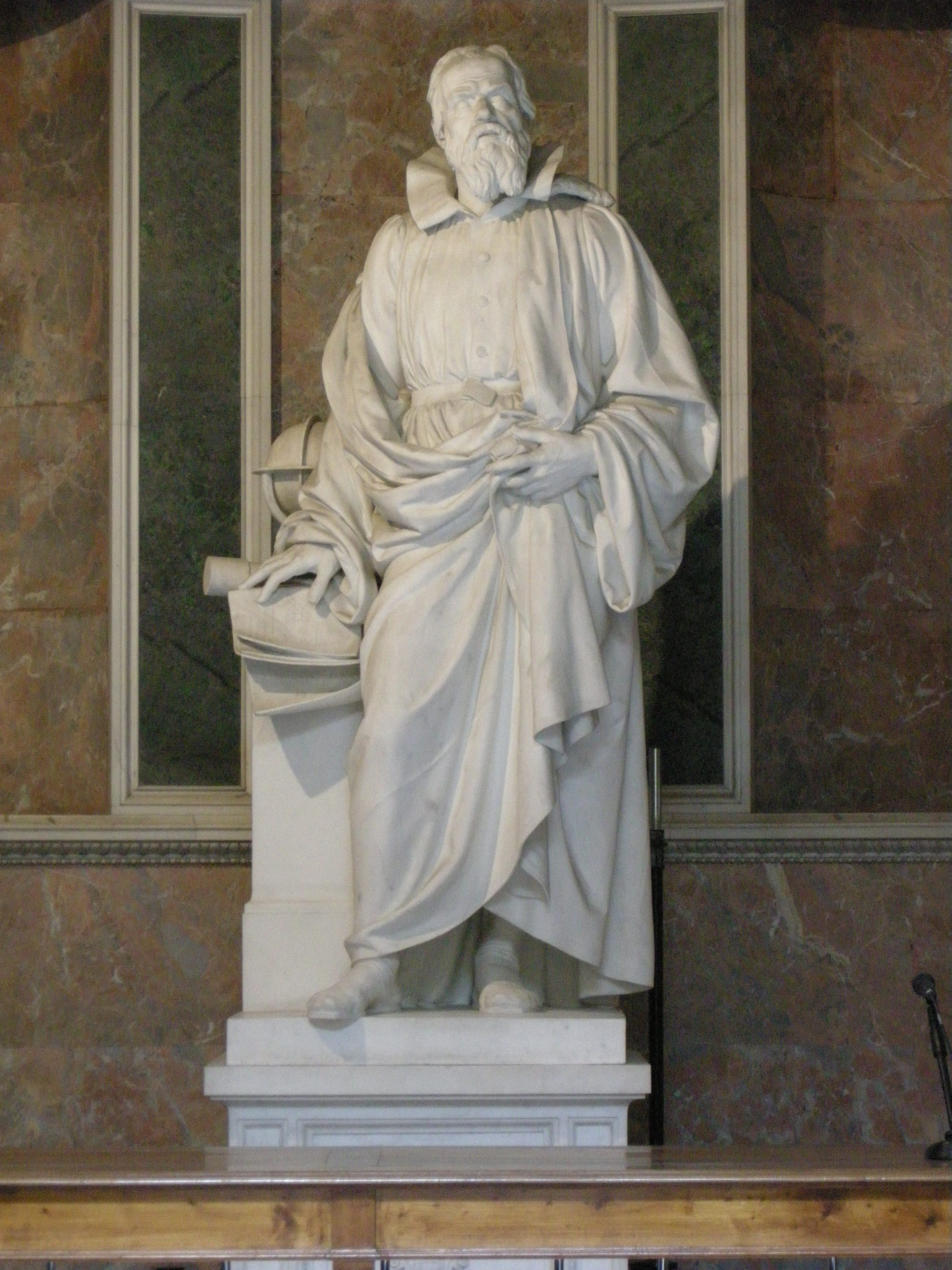 Statua di galleo, aristodemo costoli